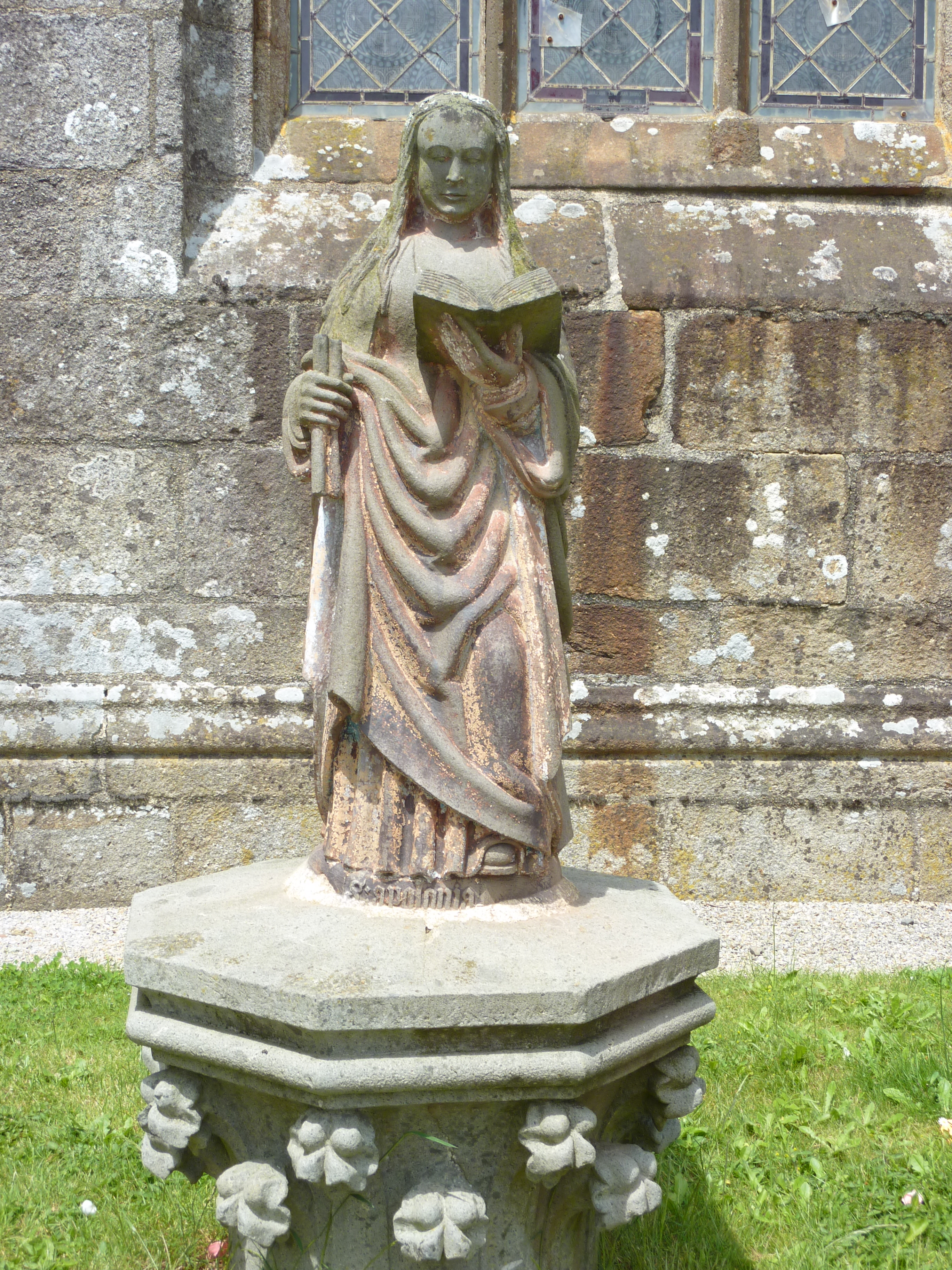 Brasparts. Statue en granite dans l'enclos paroissial : sainte Apolline